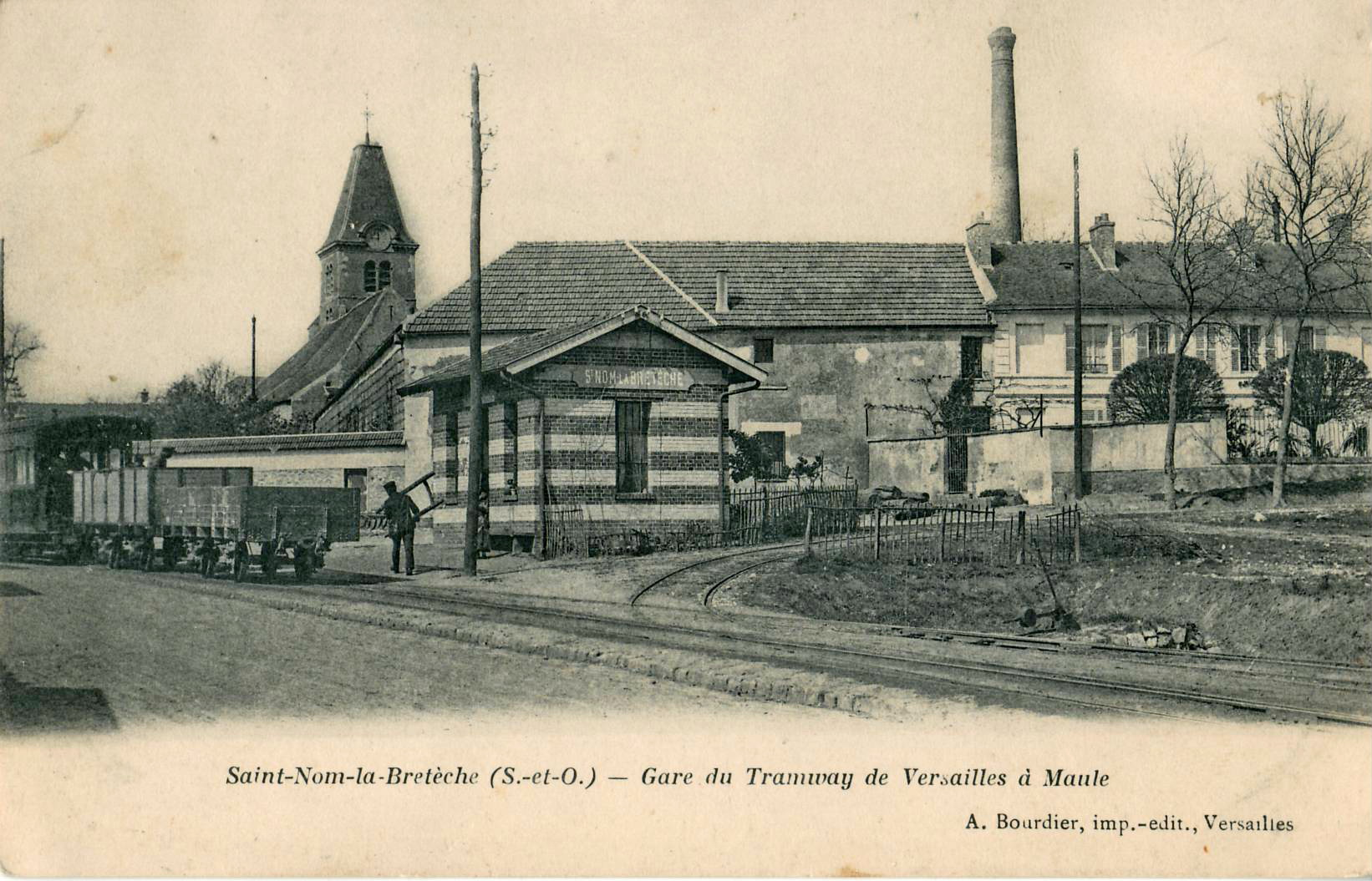 Carte postale ancienne éditée par Bourdier à Versailles :Saint-Nom-la-Bretèche - Gare du Tramway de Versailles à Maule